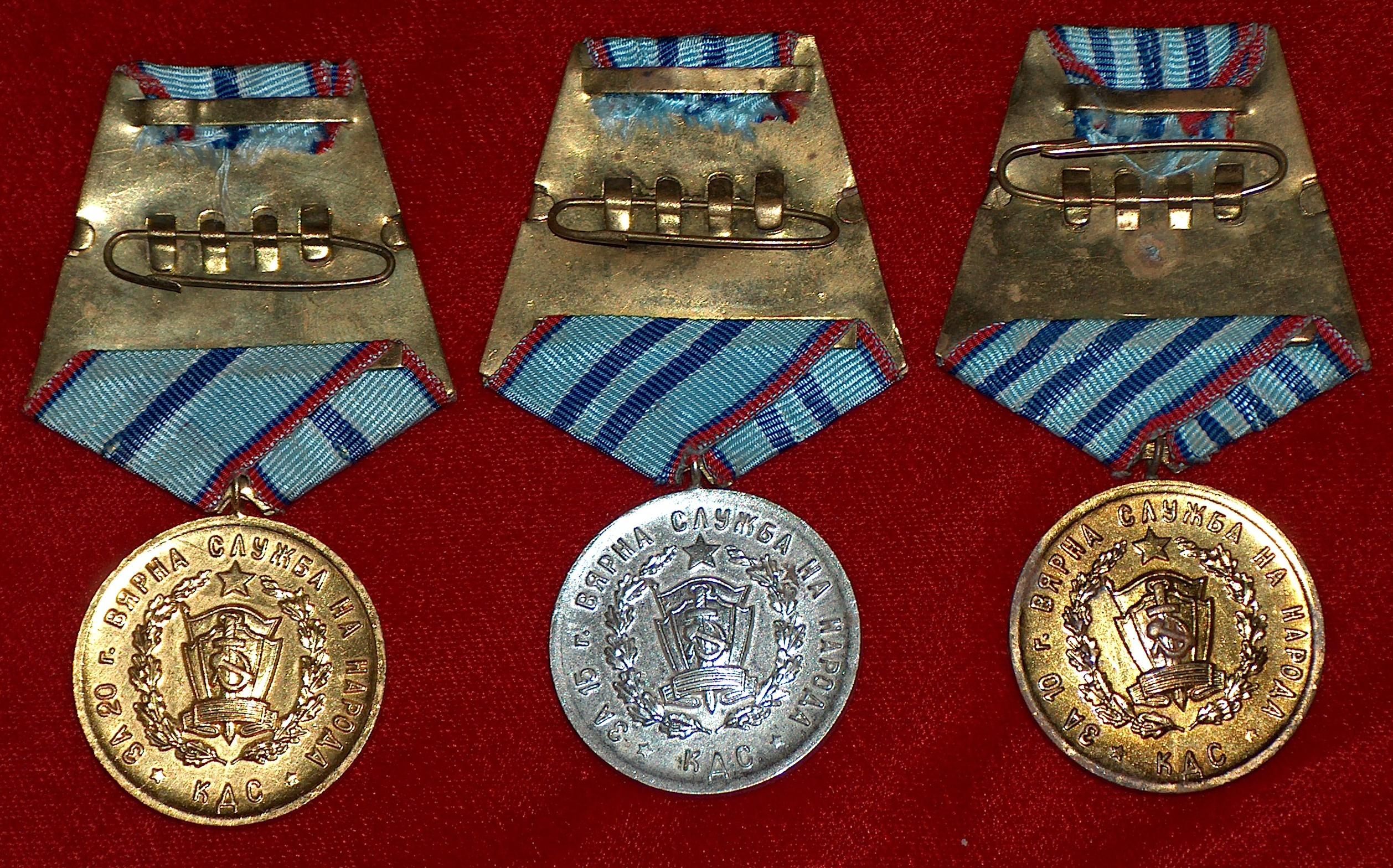 Комплект медали за прослужено време в Комитета за Държавна Сигурност (КДС), тези медали са раздавани на висши офицери от КДС във периода 1965-1969 година. През 1969г. КДС се влива в МВР и служителите на ДС са награждавани с медали на Министерството на Вътрешните Работи (МВР) реверс